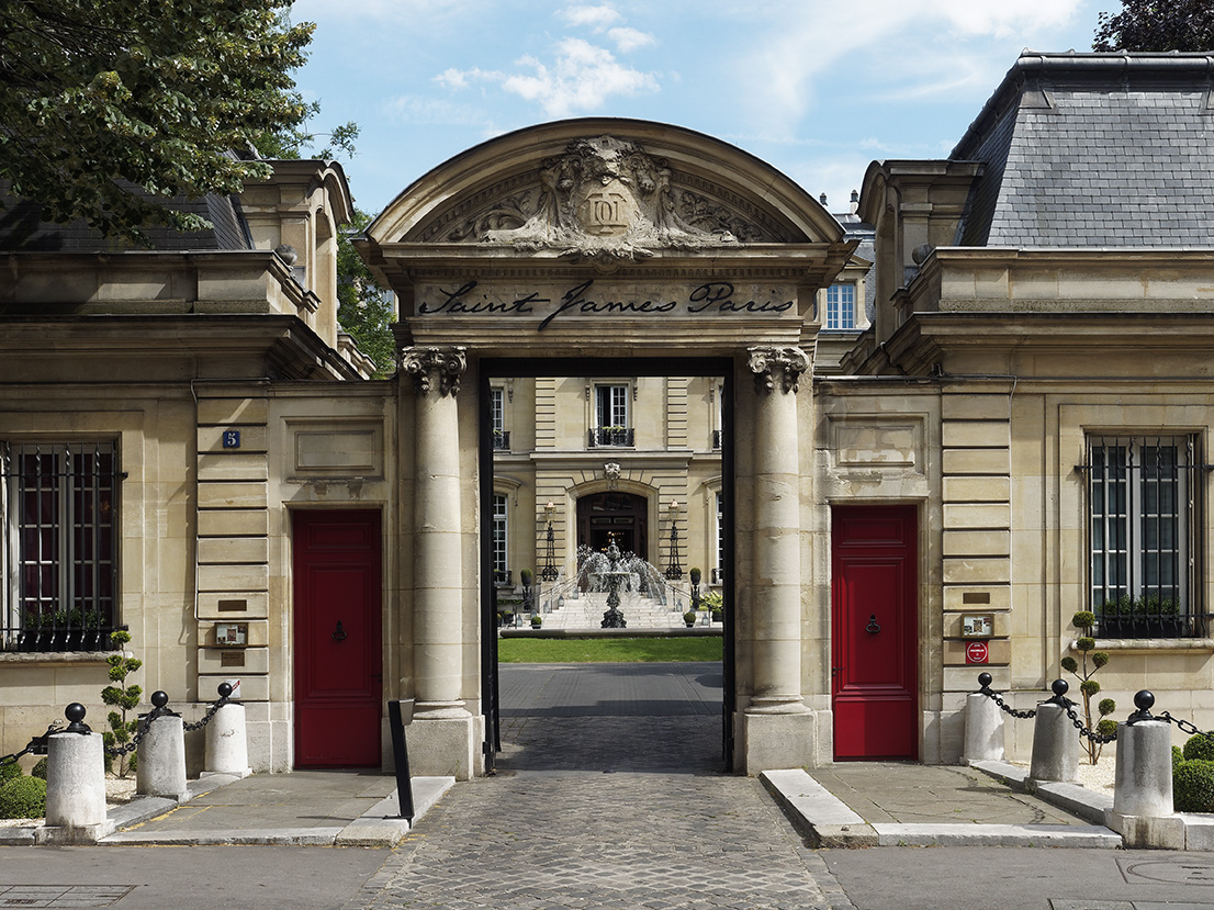 Le porche d'entrée du Saint James Paris, hôtel Relais & Châteaux et Club privé, à Paris 16e